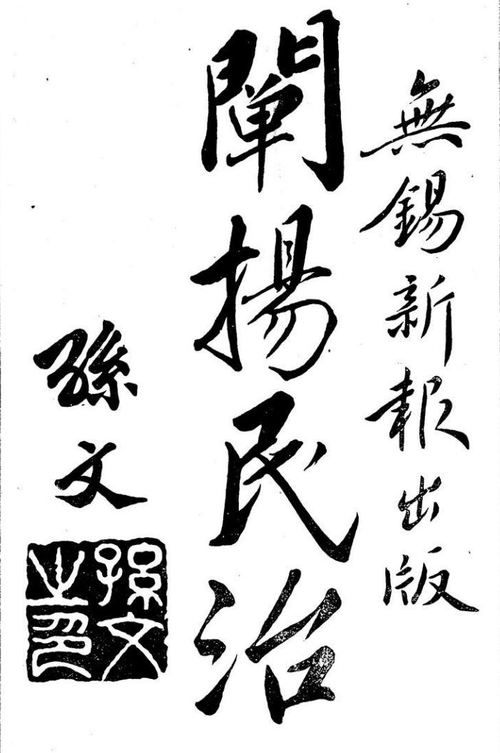 《无锡新报》 1922年9月1日 孙中山祝词